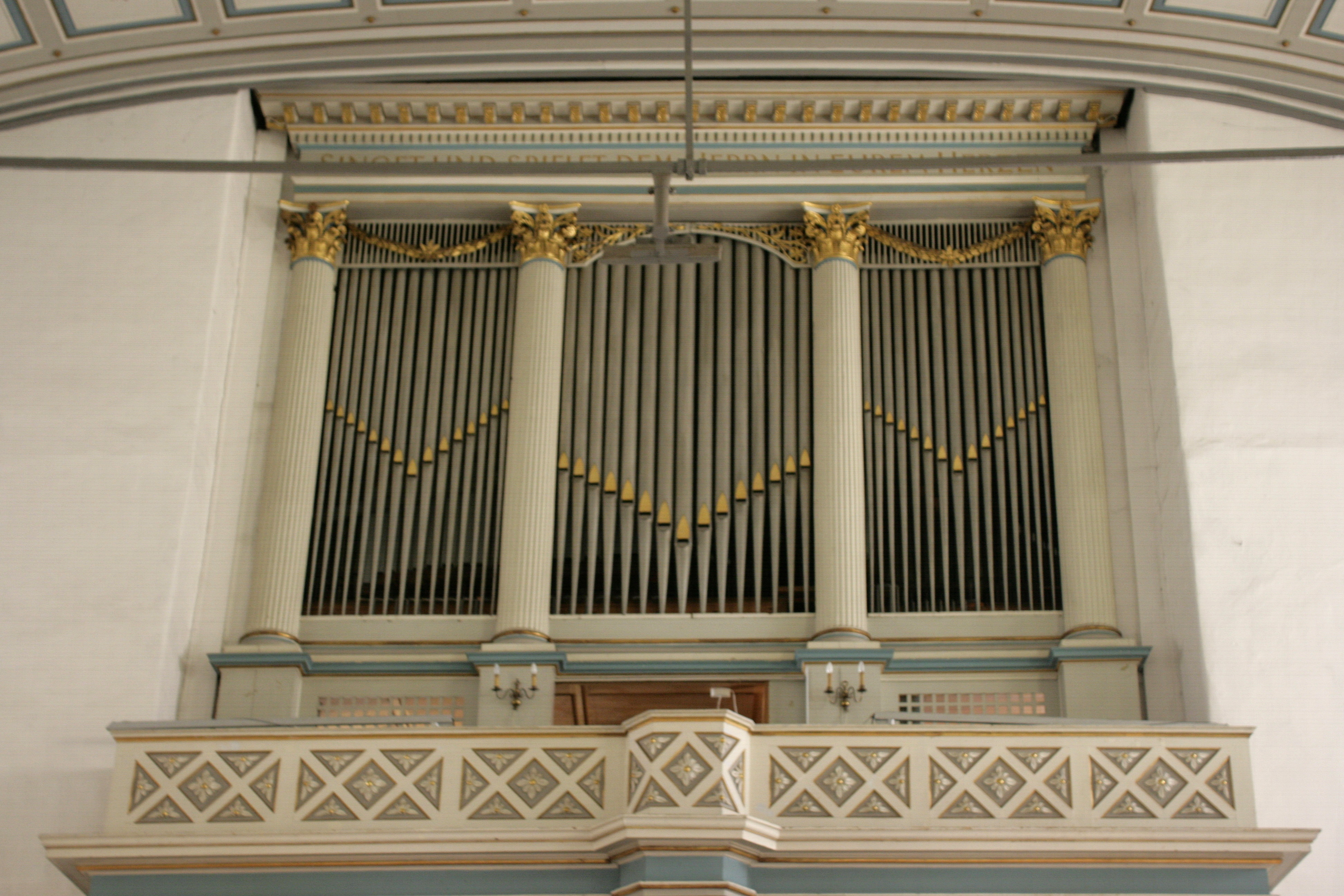 Evangelische St.-Georgs-Kirche auf dem Kirchplatz in Hattingen